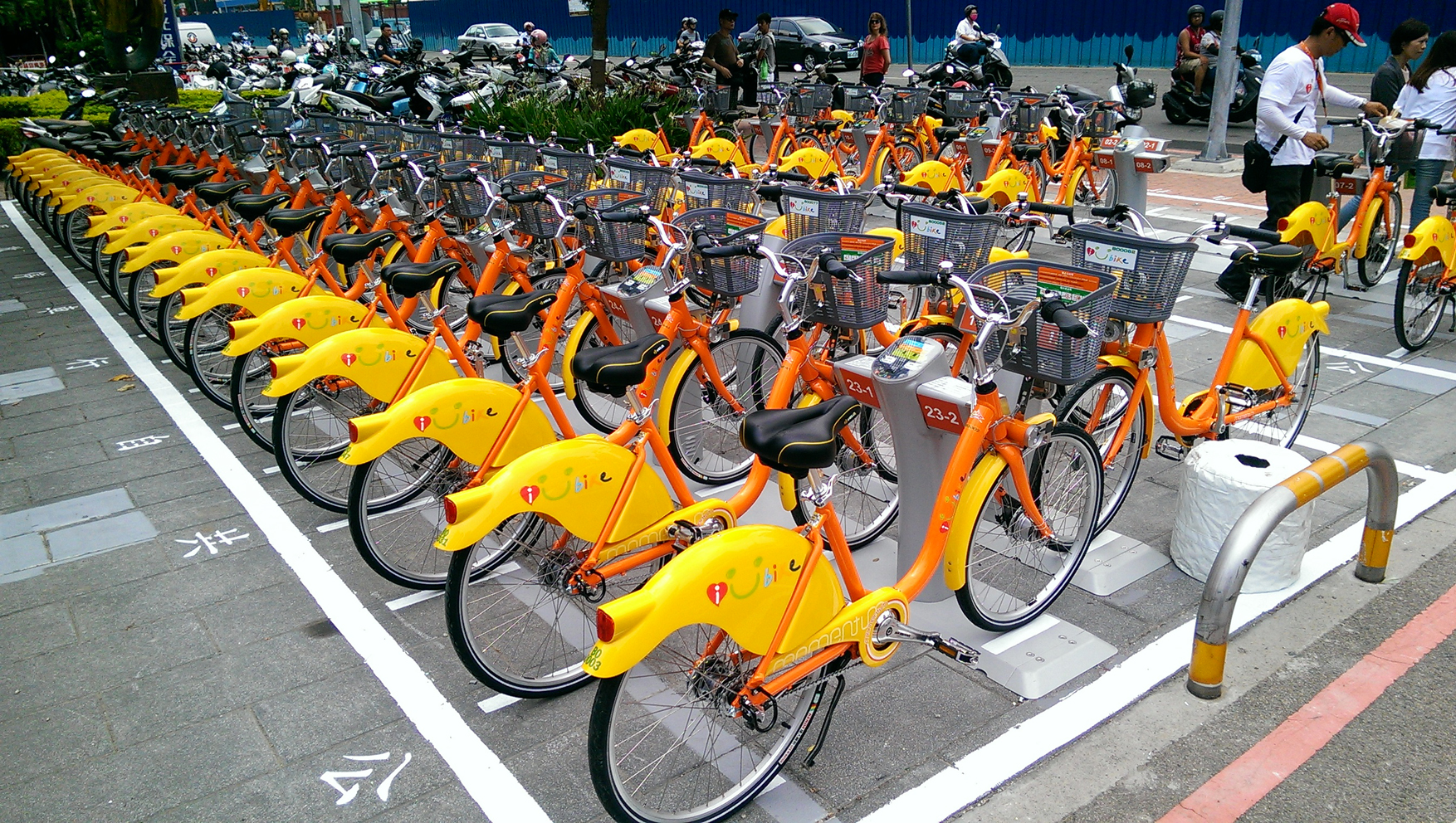 臺中市公共自行車市政府站